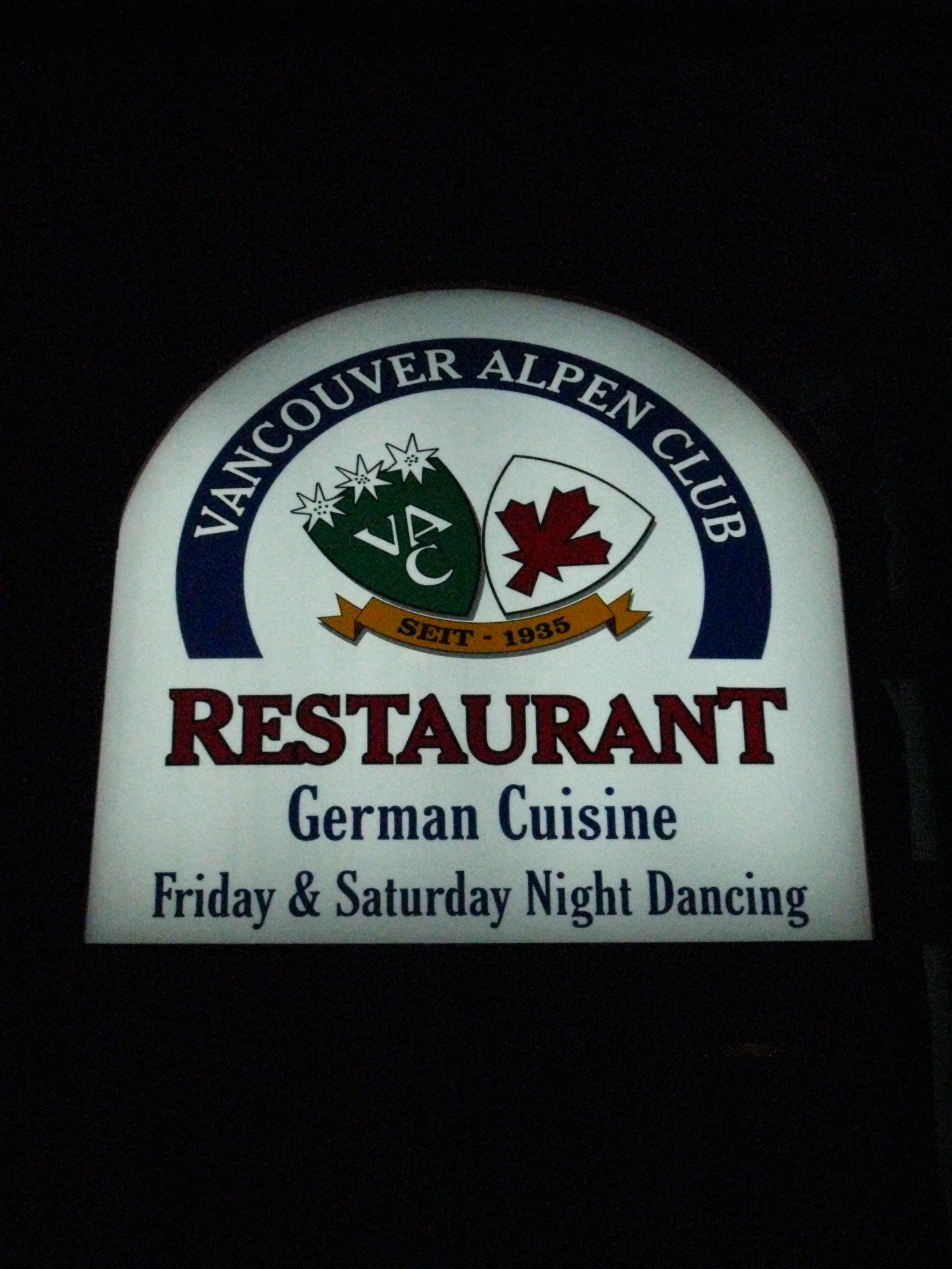 alpen club